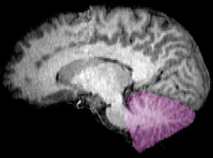 Cerebellum.